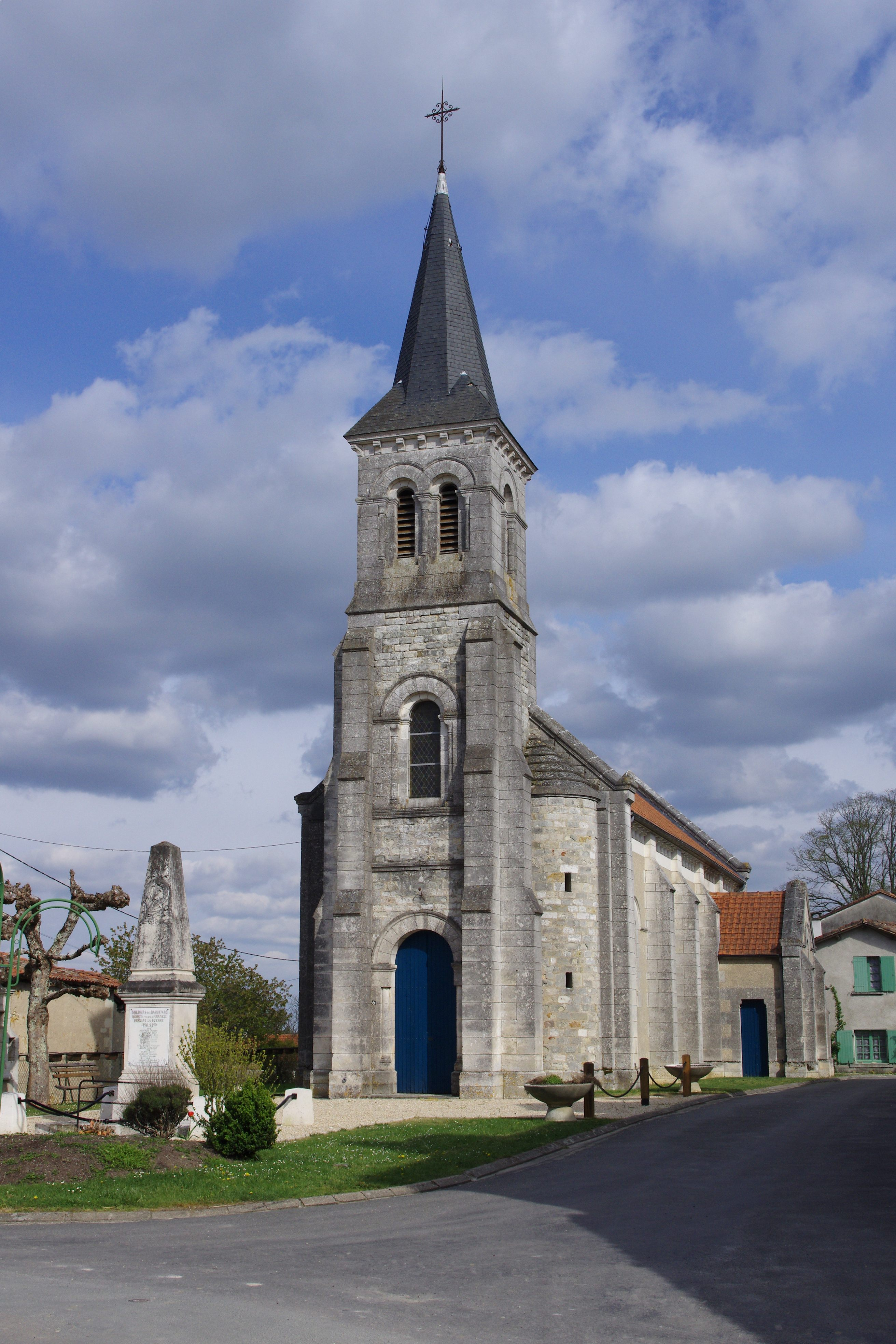 L'église de Bardenac, Charente, France.